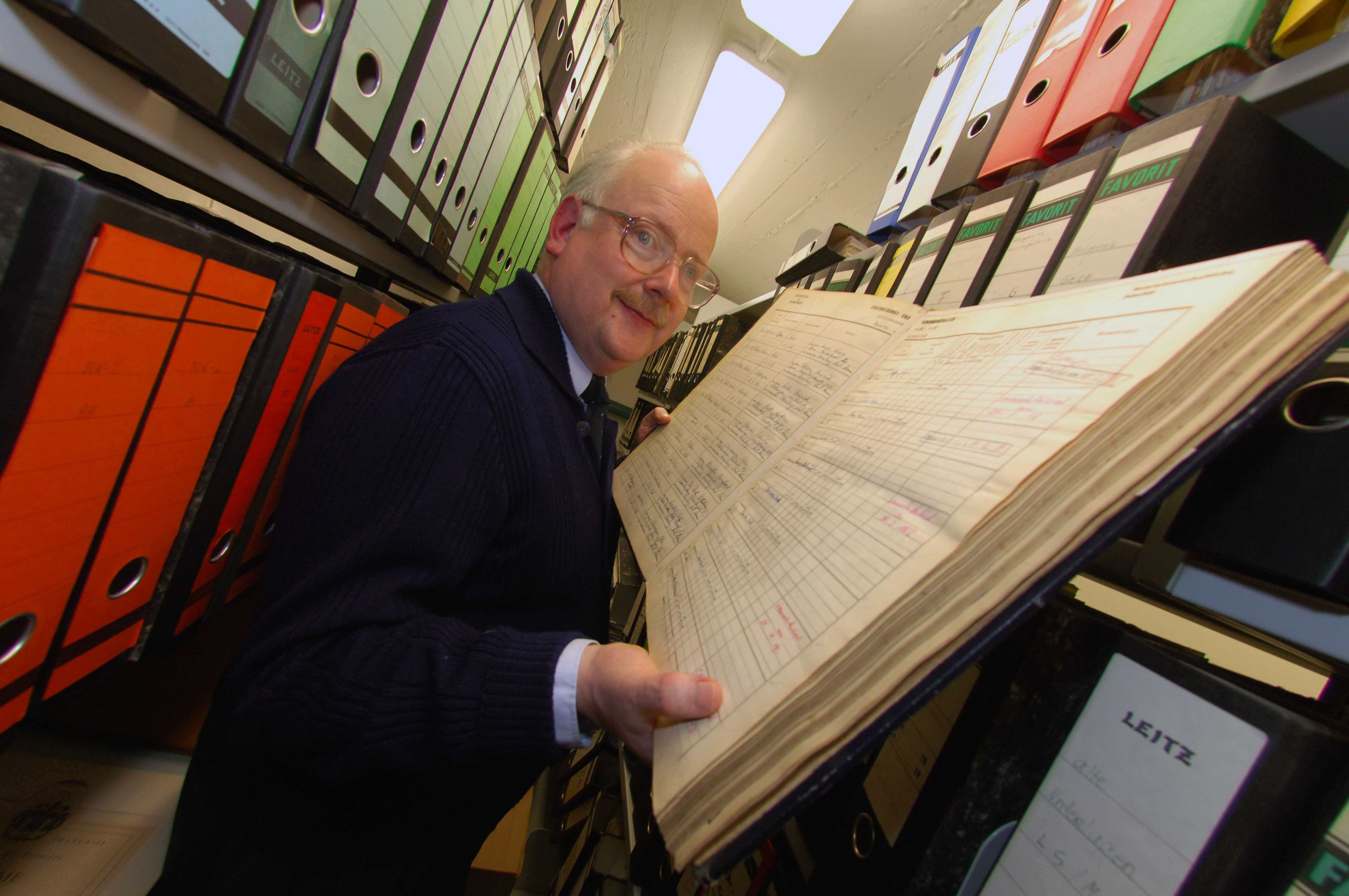 Archivar bei der Arbeit im Archiv (Wolfgang Müller im Archiv der Universität des Saarlandes)